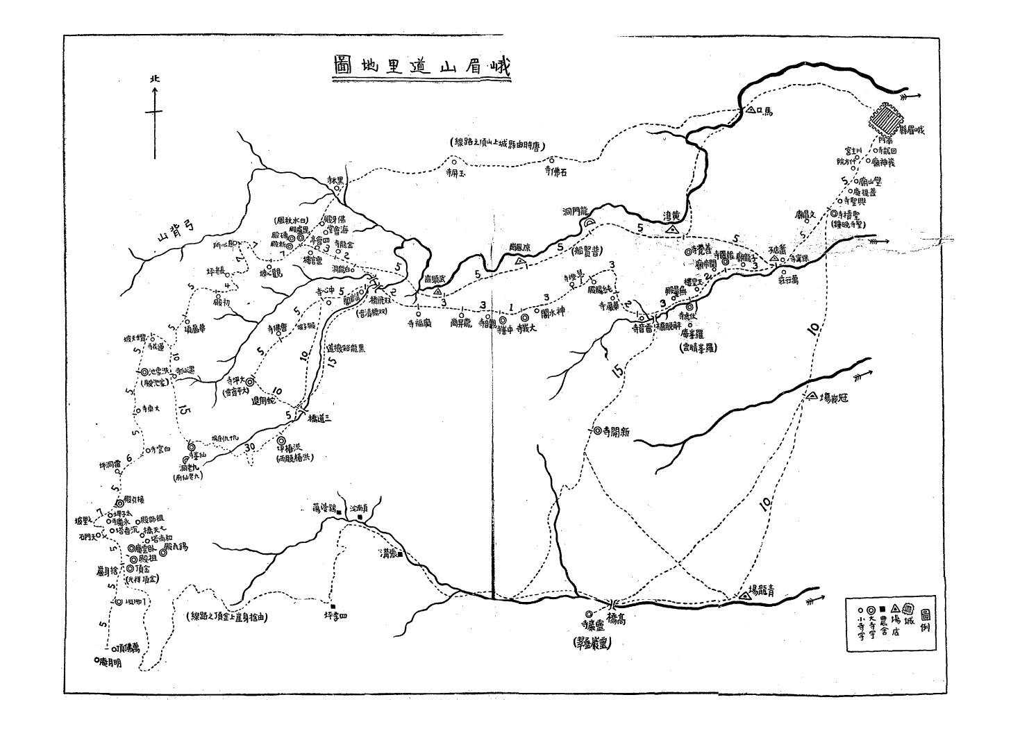 中文（台灣）: 峩嵋山道里地圖